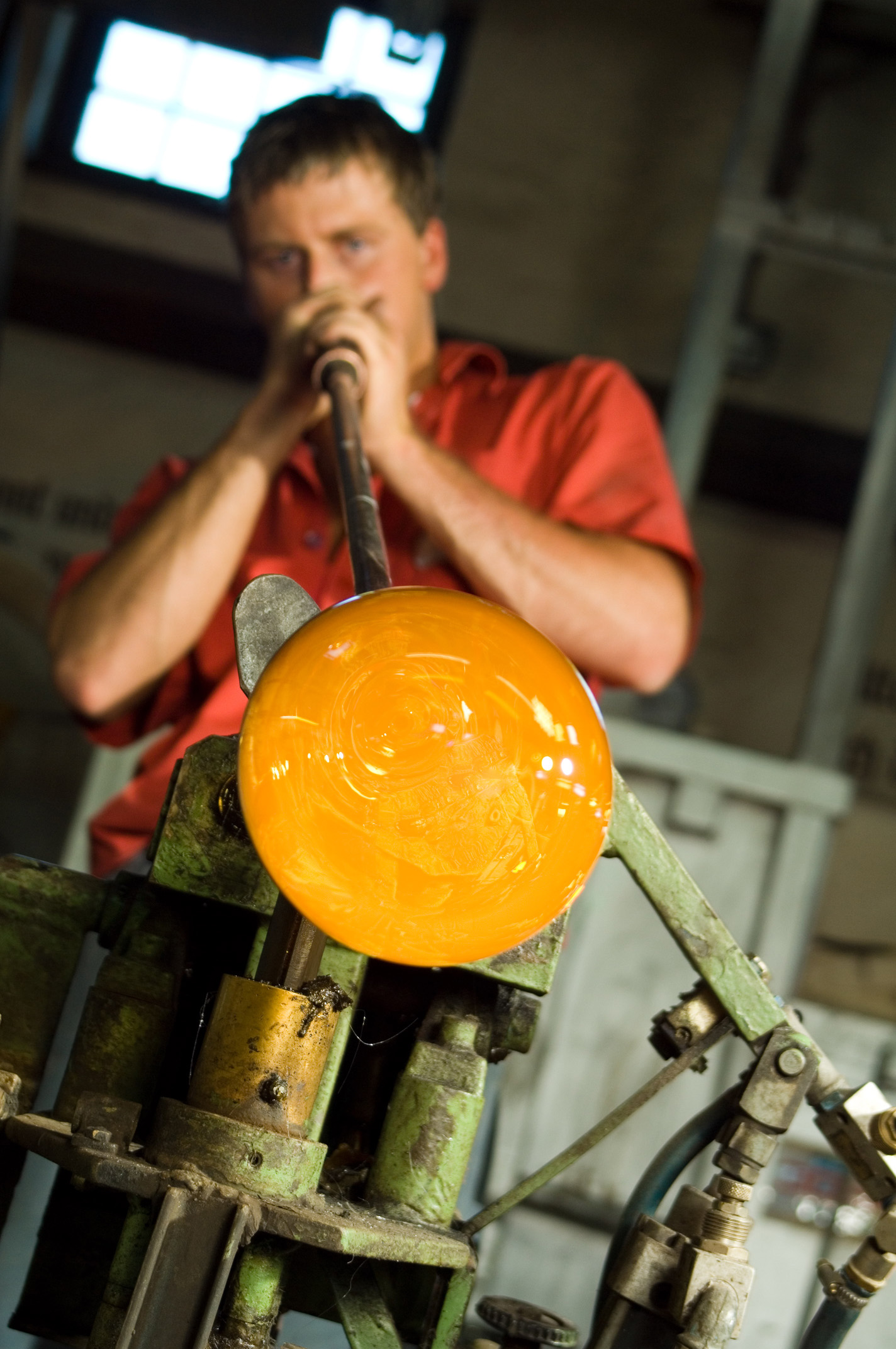 Joska Kristall Glasparadies, Glasmacher bei der Arbeit